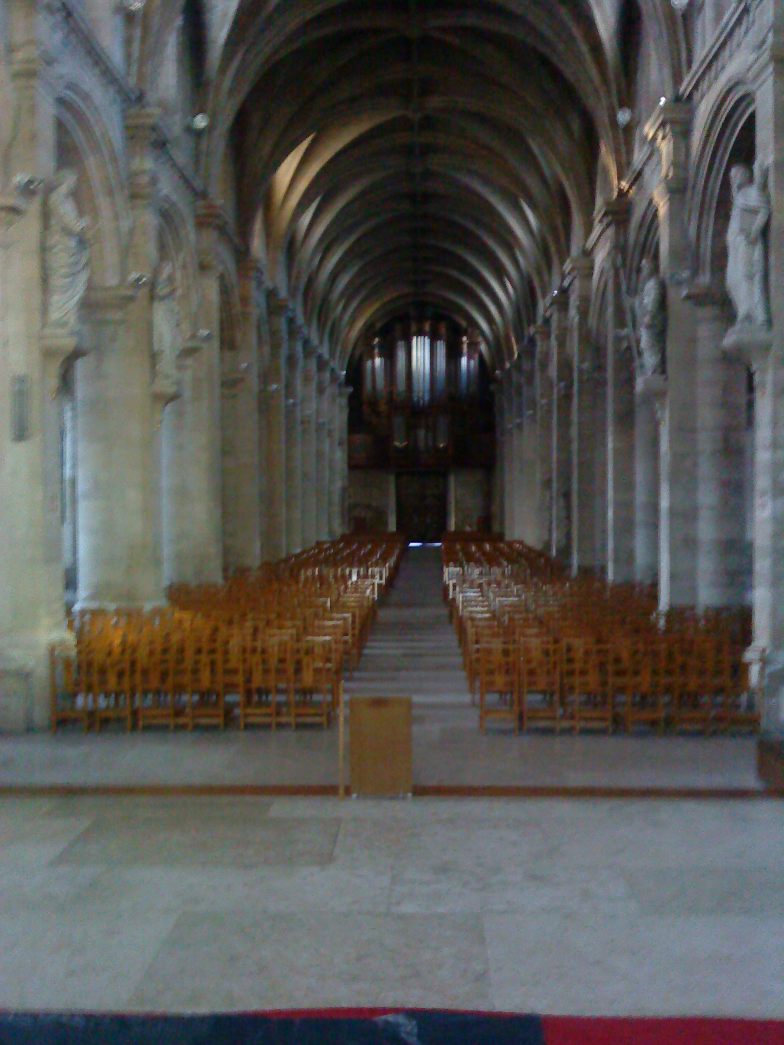 La nef centrale depuis le chœur.